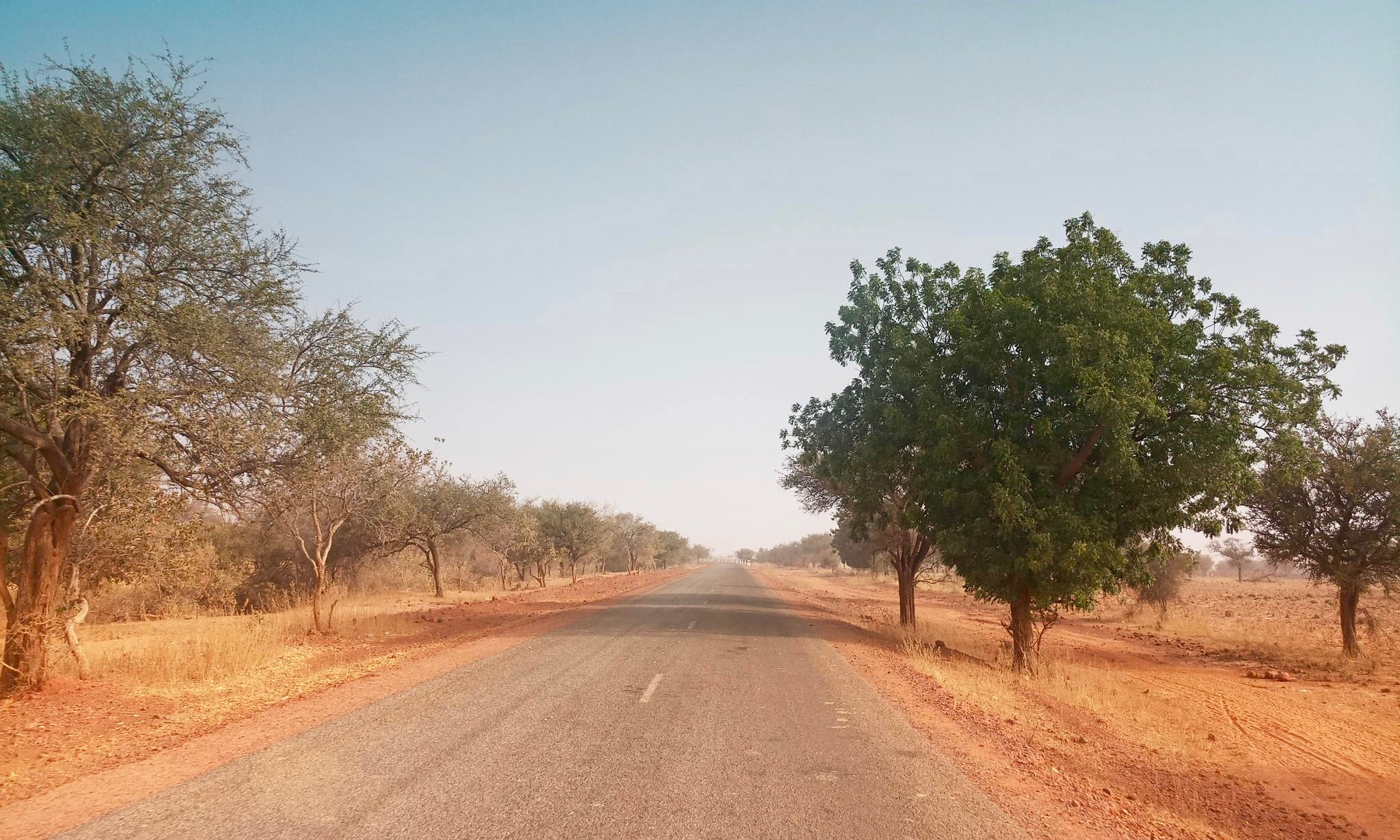 Nationalstraße 27, Gemeinde Tamou, Niger.